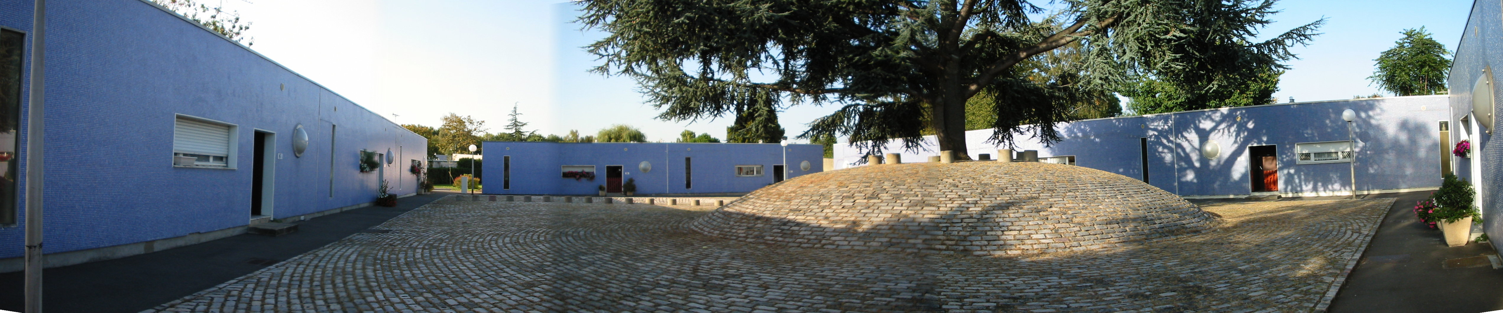 Ile-de-France / Essonne / Grigny / Quartier de la Grande Borne / Secteur des patios, place de l'Equinoxe